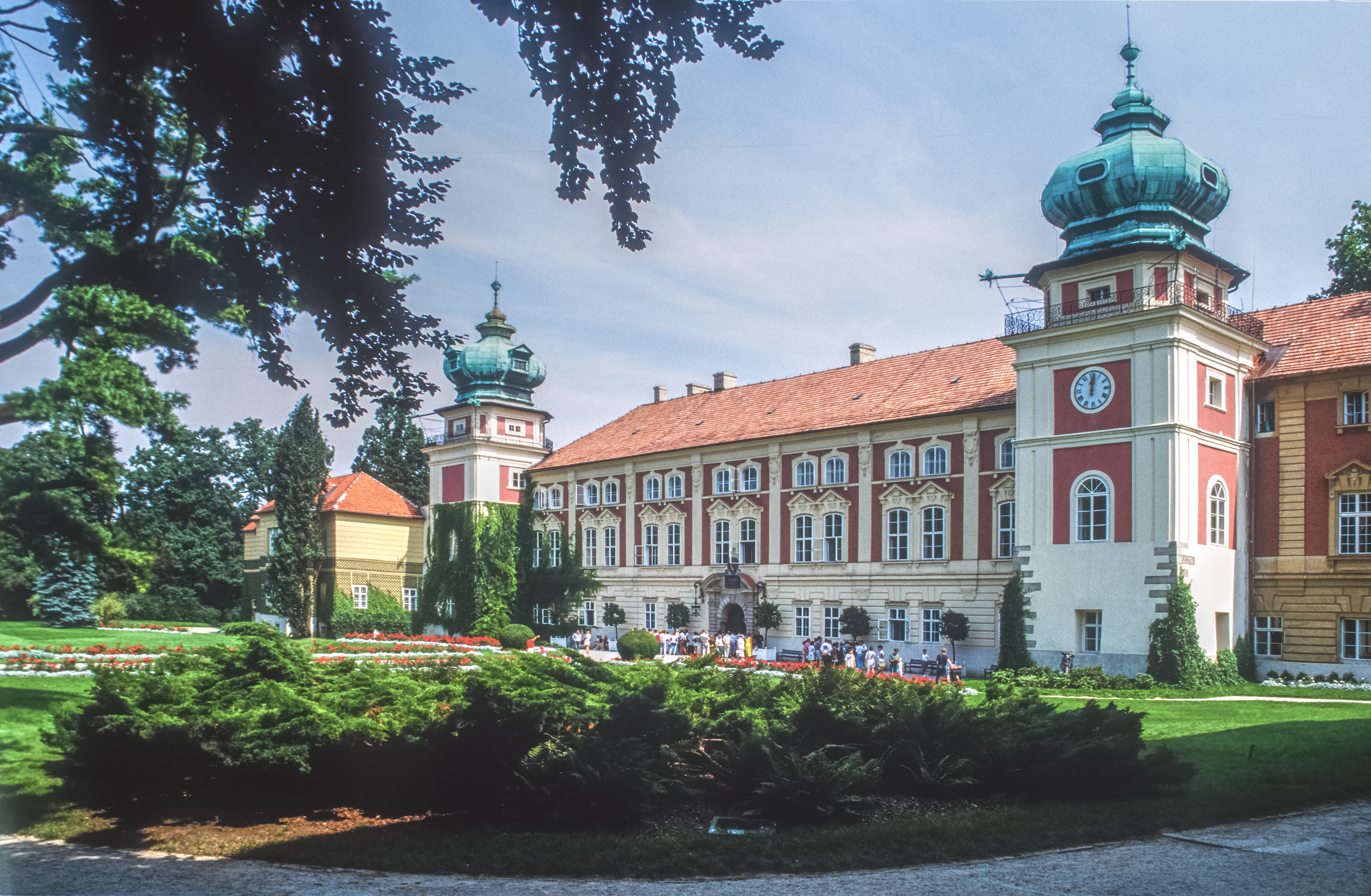 Łańcut